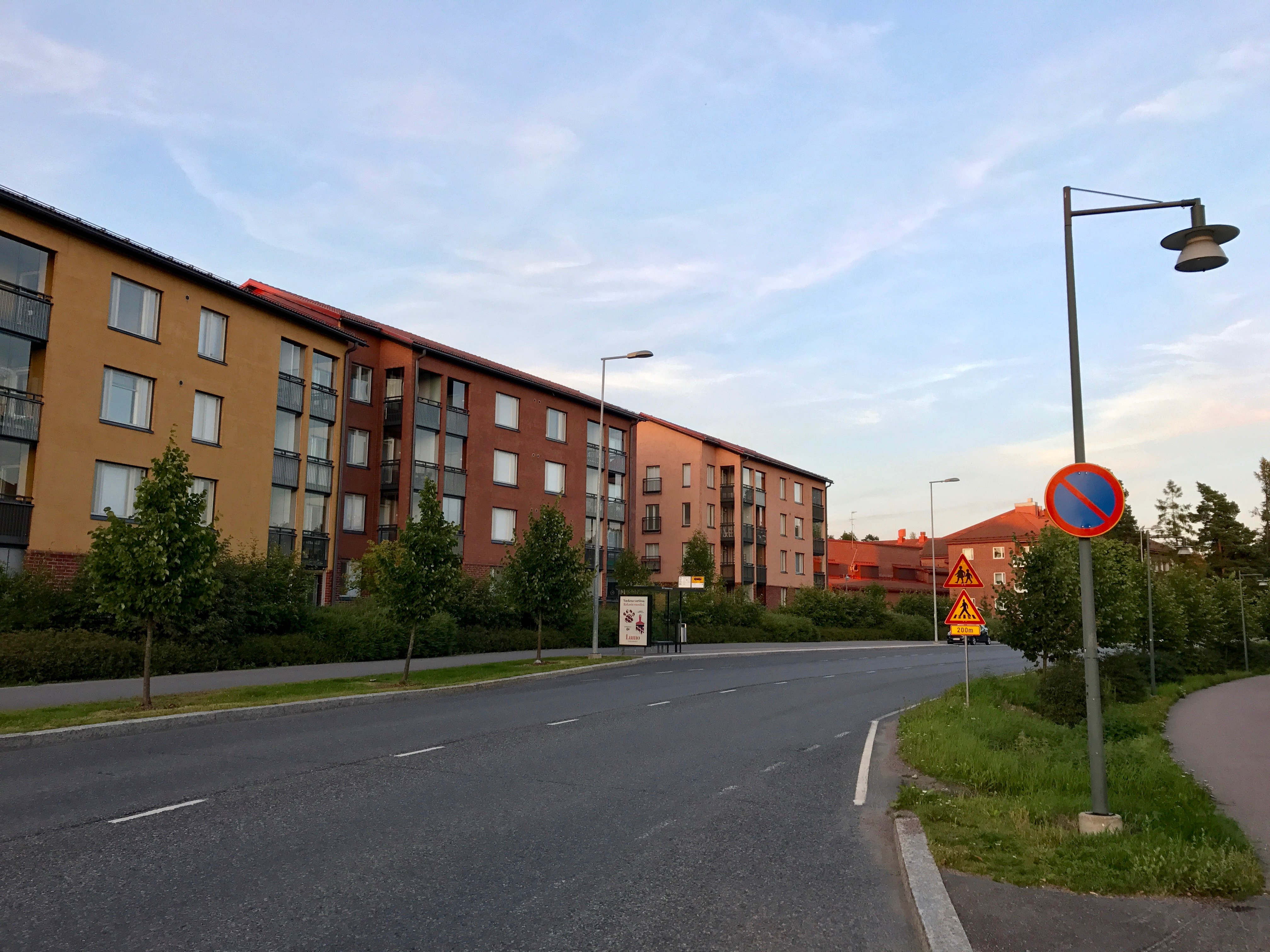 Näkymä Vantaan Ylästöntieltä.